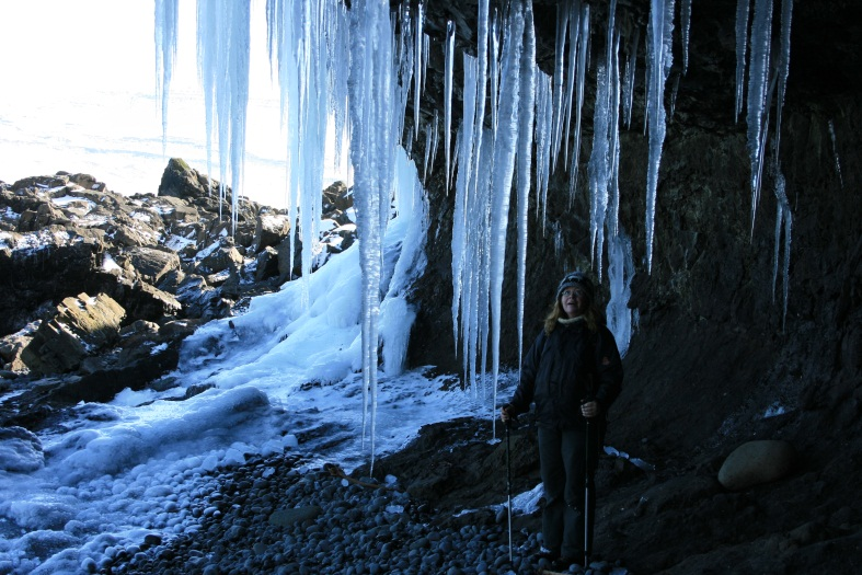 Páskahellir uitan við Neskaupstað